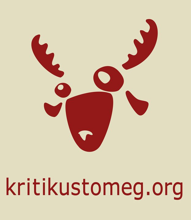 A Kritikus Tömeg oldal régi logója.